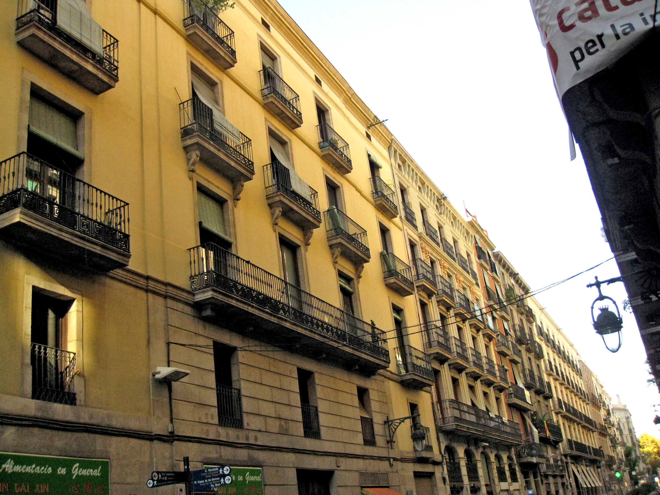 Vista del carrer de la Princesa, a Barcelona, en el tram comprès entre els carrers de Montcada i del Comerç.